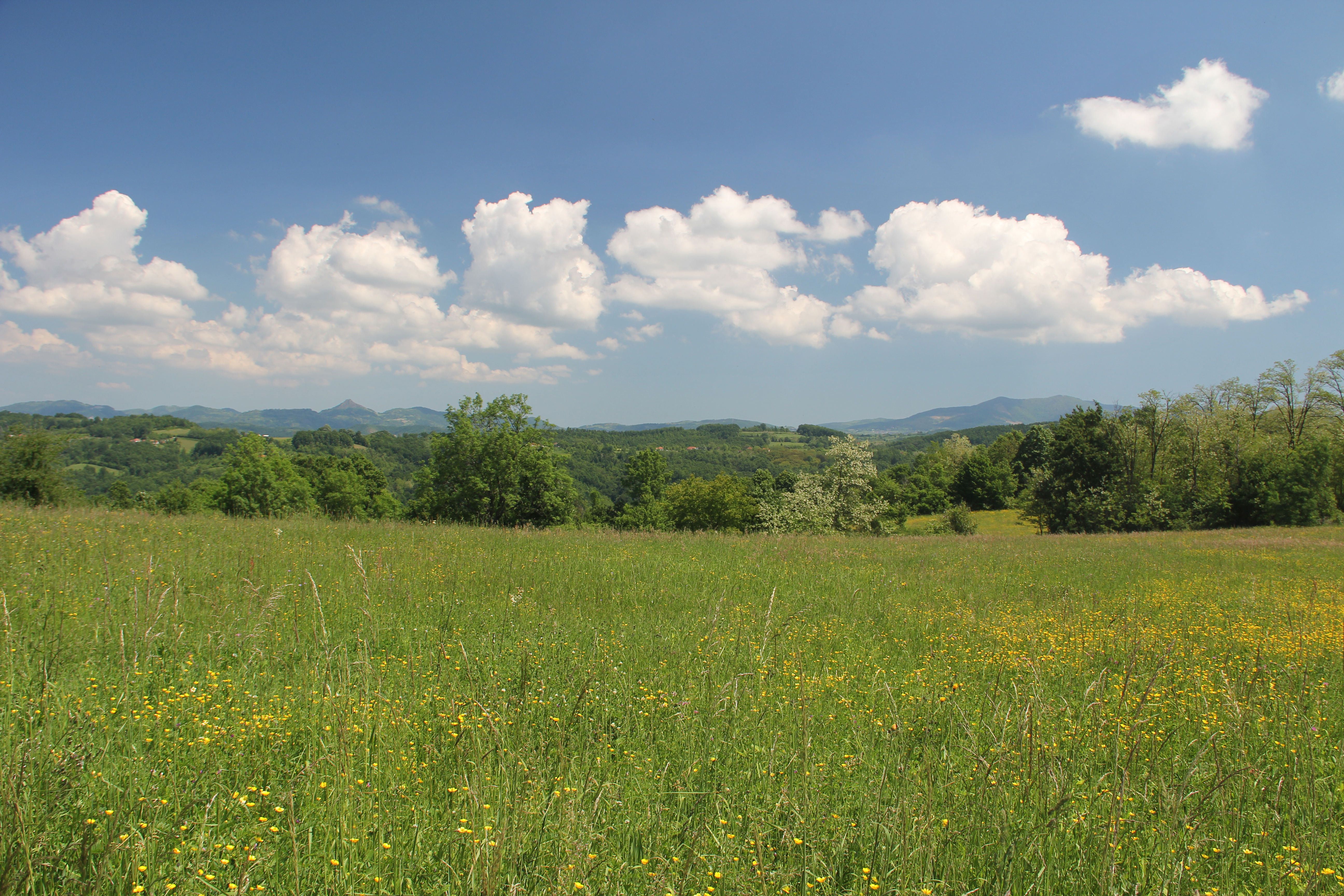 Vrnčani